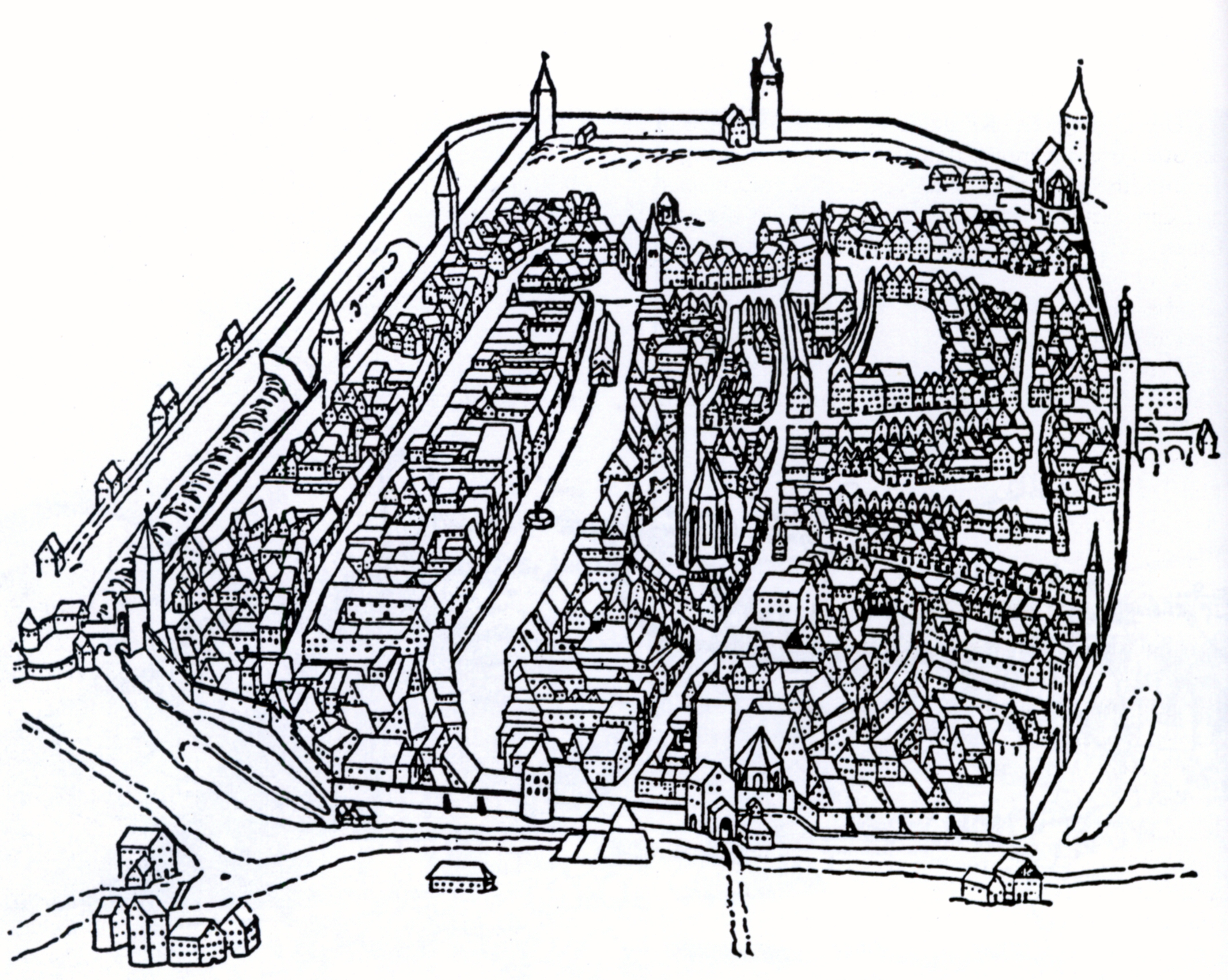 Ansicht der Stadt Kaufbeuren, Federzeichnung von Caspar Sichelbein, Ev. Kirchenarchiv Kaufbeuren